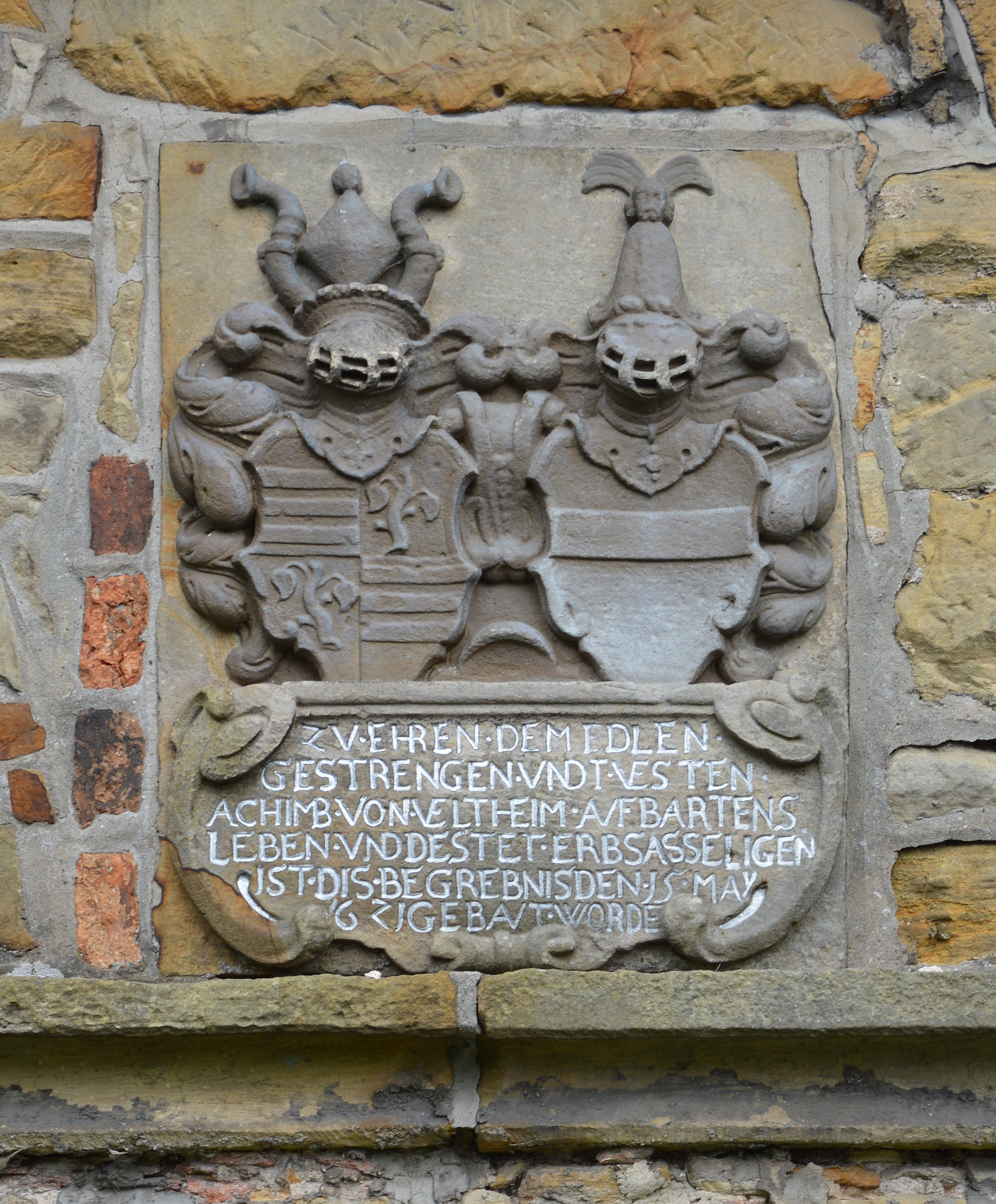 Dorfkirche Groß Bartensleben